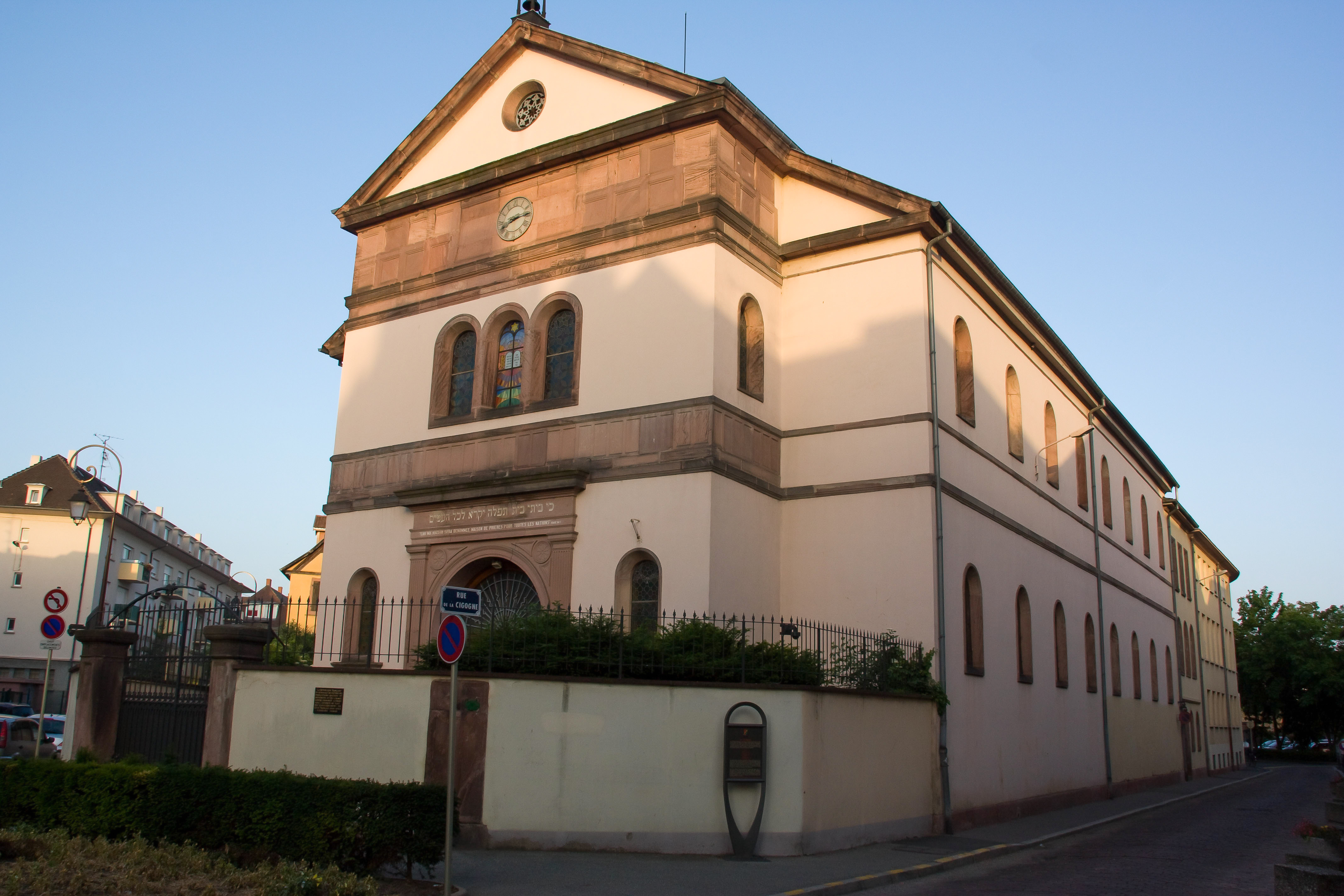 Synagogue de Colmar / Colmar / Haut-Rhin / France